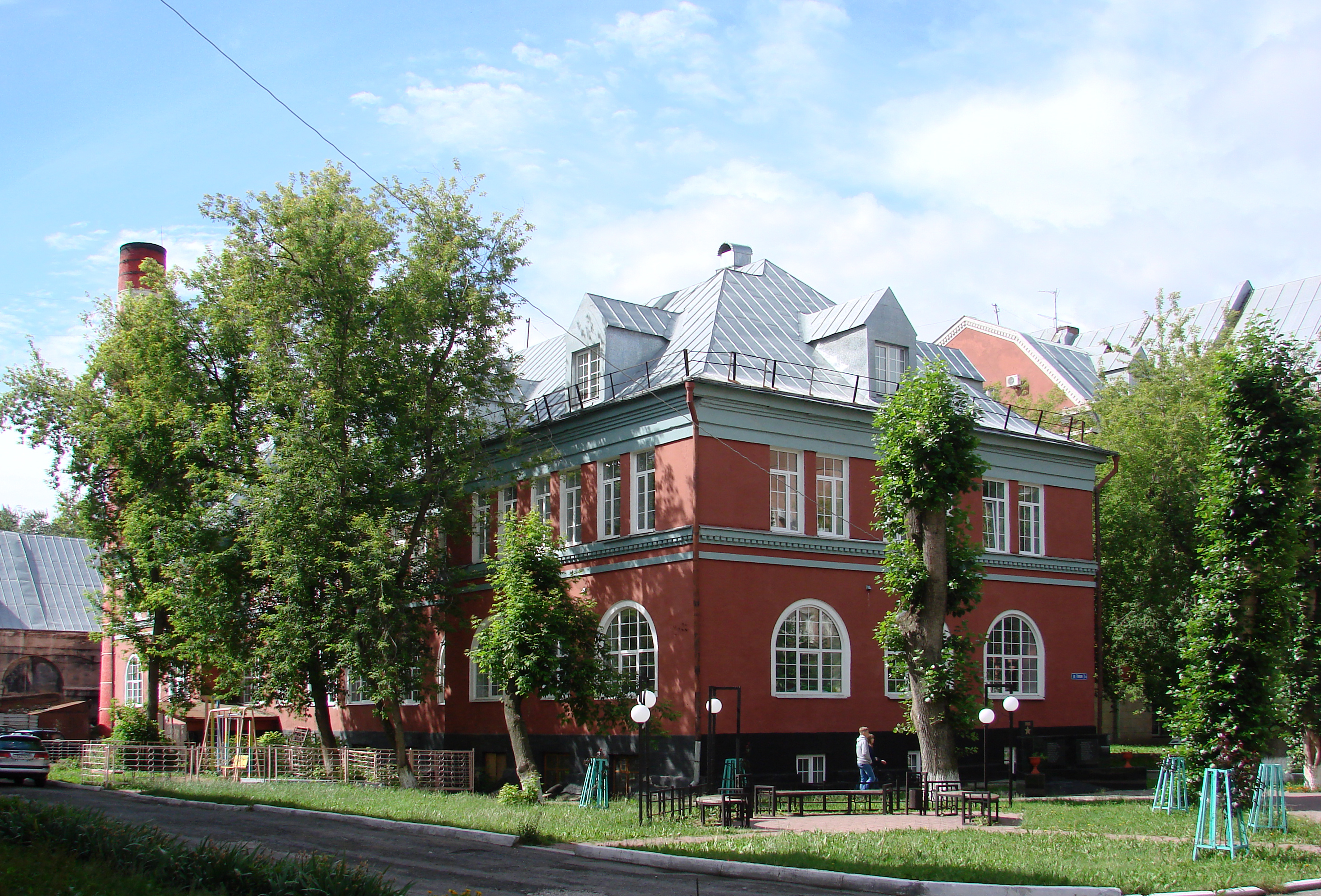 Здание, где на геологическом факультете Пермского университета работали астроном Орлов С.В., математик Фридман А.А., геолог и петрограф Полканов А.А., астрофизик Шайн Г.А., геолог Герасимов Н.П. Пермь, улица Генкеля, 5а